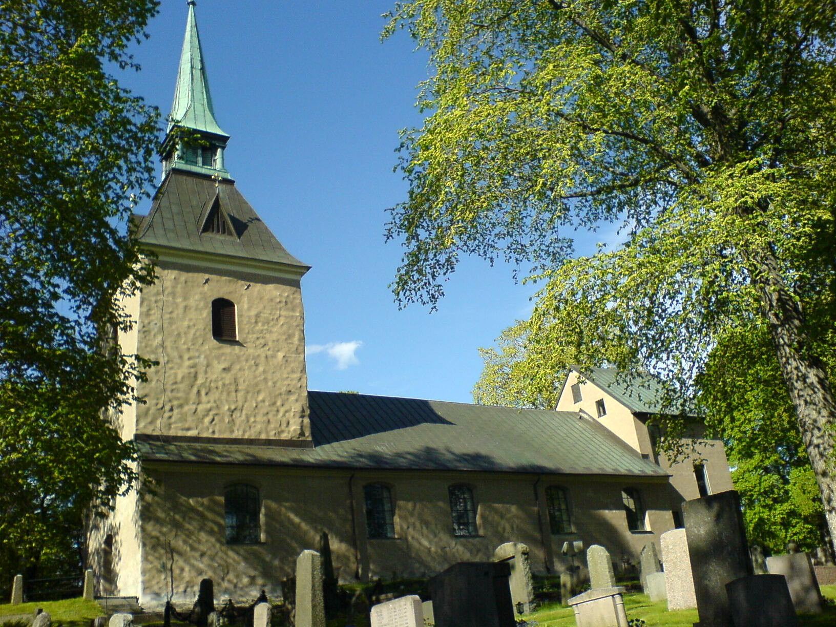 Fotograf: Ingmar Engström